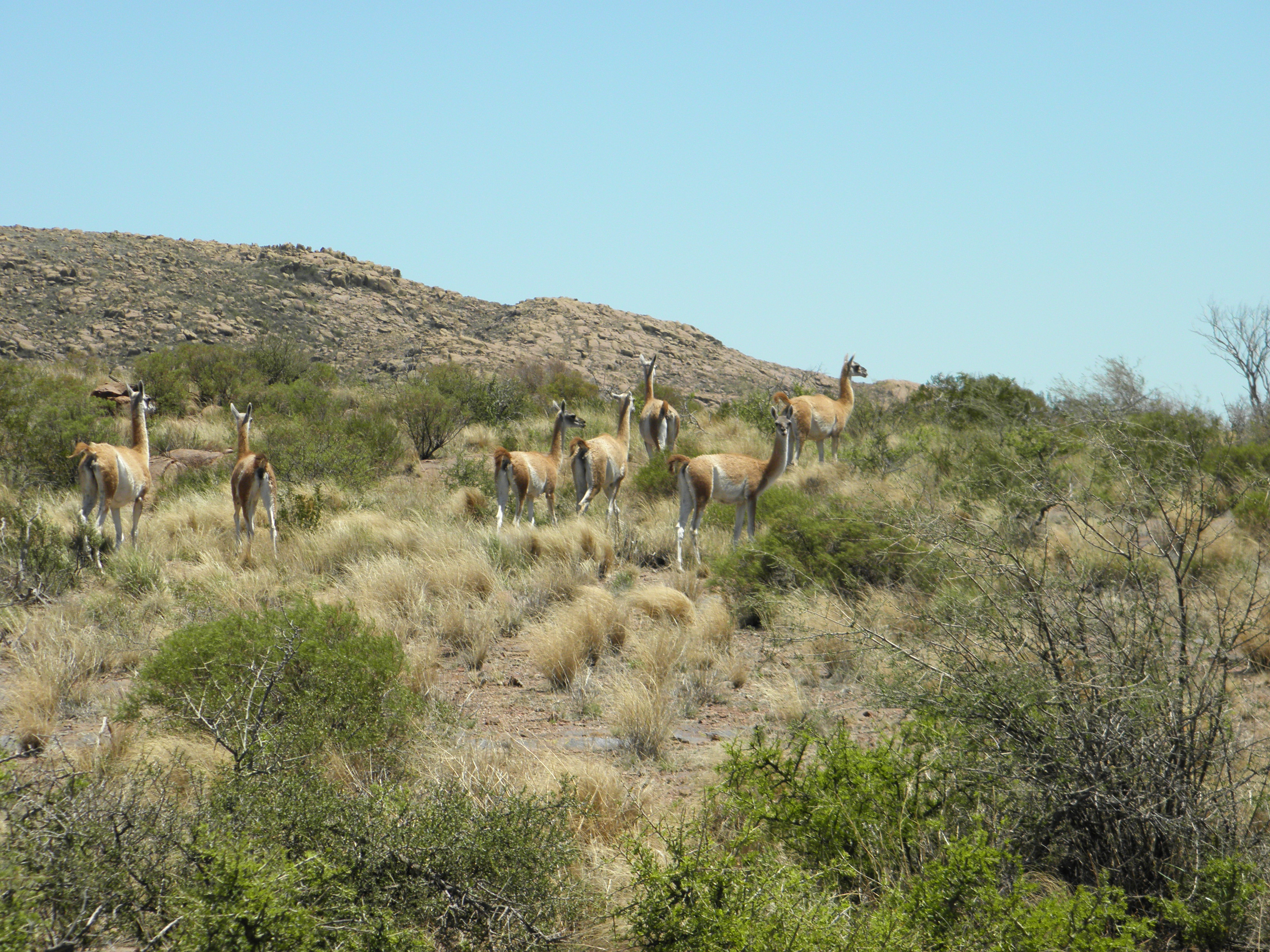 Parque Nacional Lihue Calel, La Pampa, Argentina .